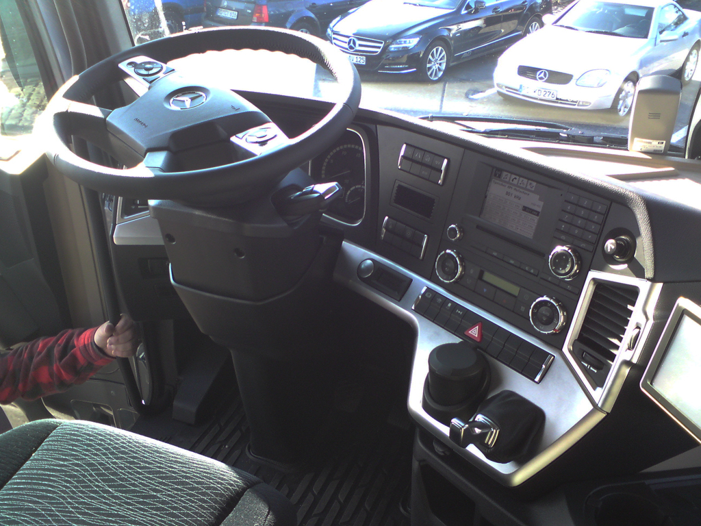 Interieur der neuen (2.) Generation des Mercedes-Benz Actros mit BigSpace-Fahrerhaus (Innenstehhöhe: 1,99m) in StyleLine-Ausstattung.